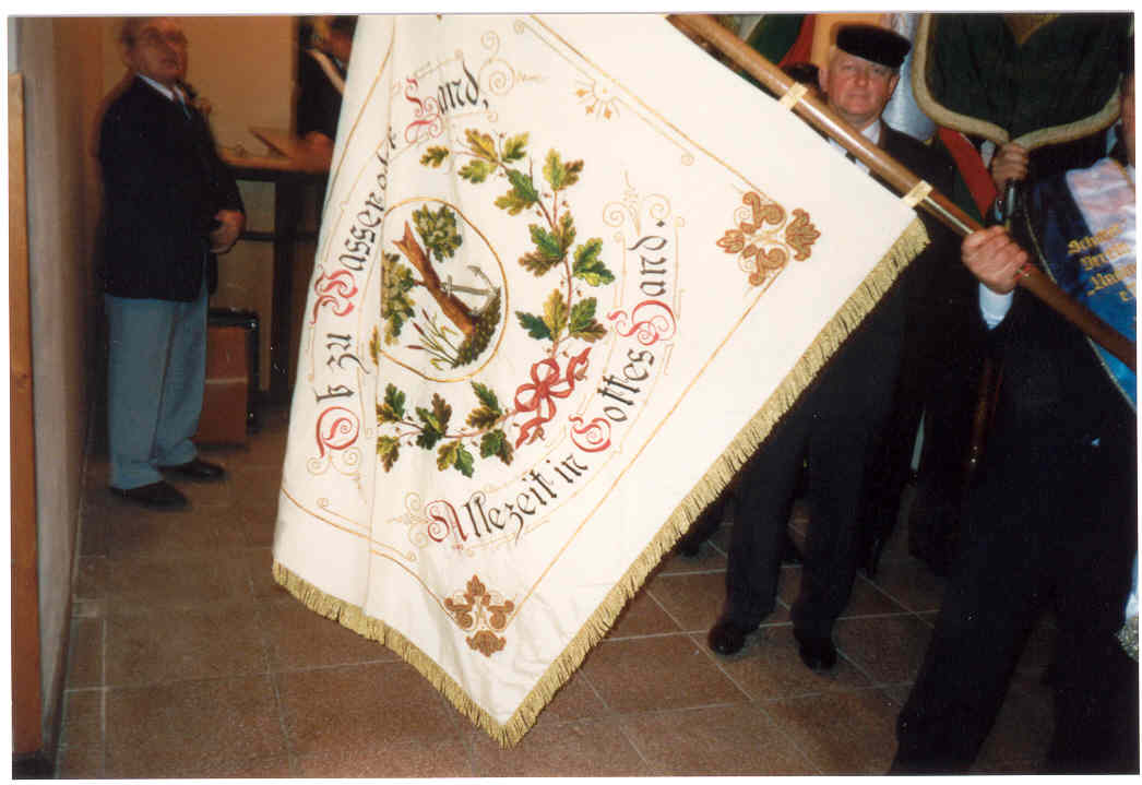 Flagge vom Schifferverein Neptun 1899 (eigene Arbeit)